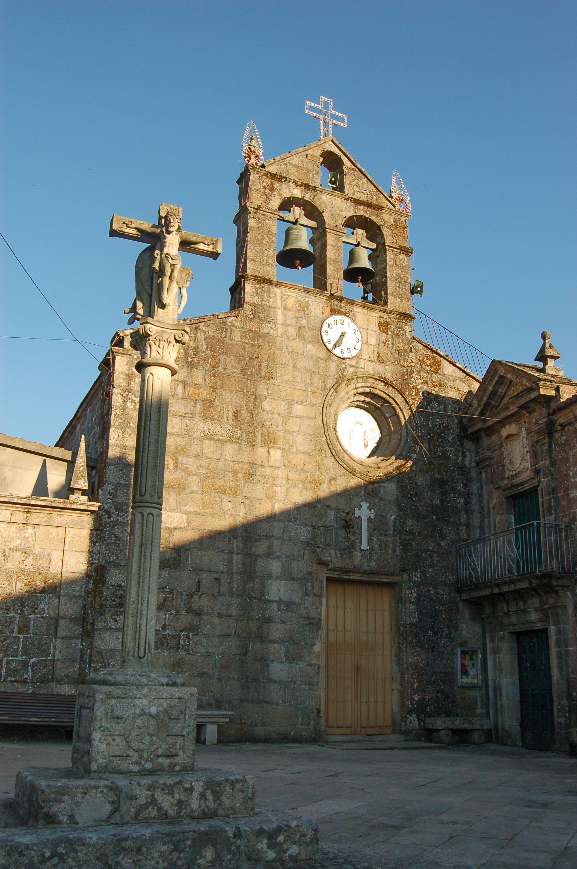 Fachada da igrexa de San Pedro de Tenorio